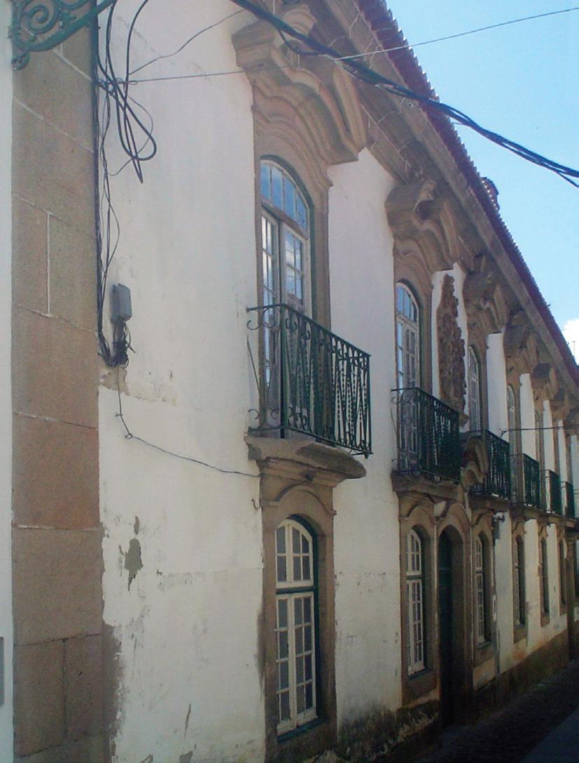 Solar de Pedro Cardoso Frazão, séc. XVII, Castyelo Branco